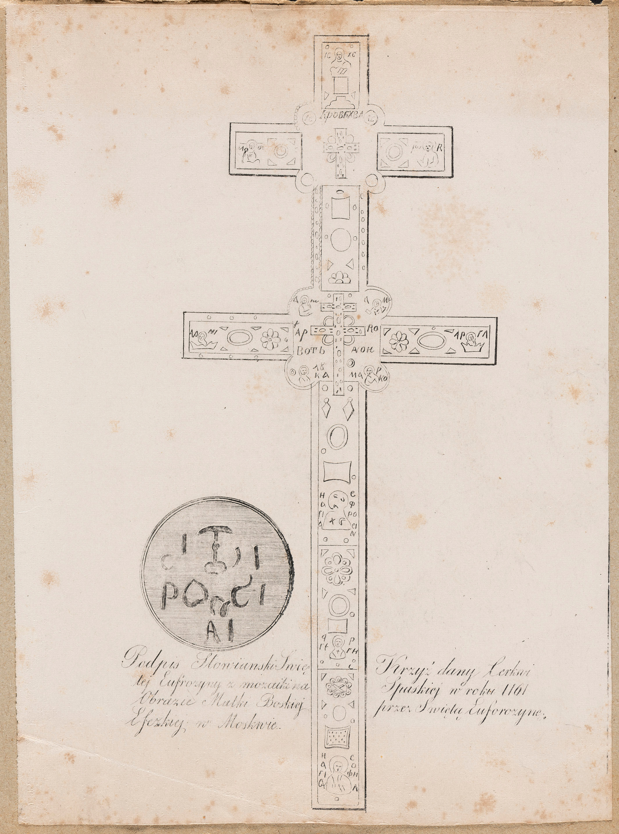 Беларуская (тарашкевіца): Крыж Эўфрасіньні Полацкай (Kryž Eŭfrasińni Połackaj)